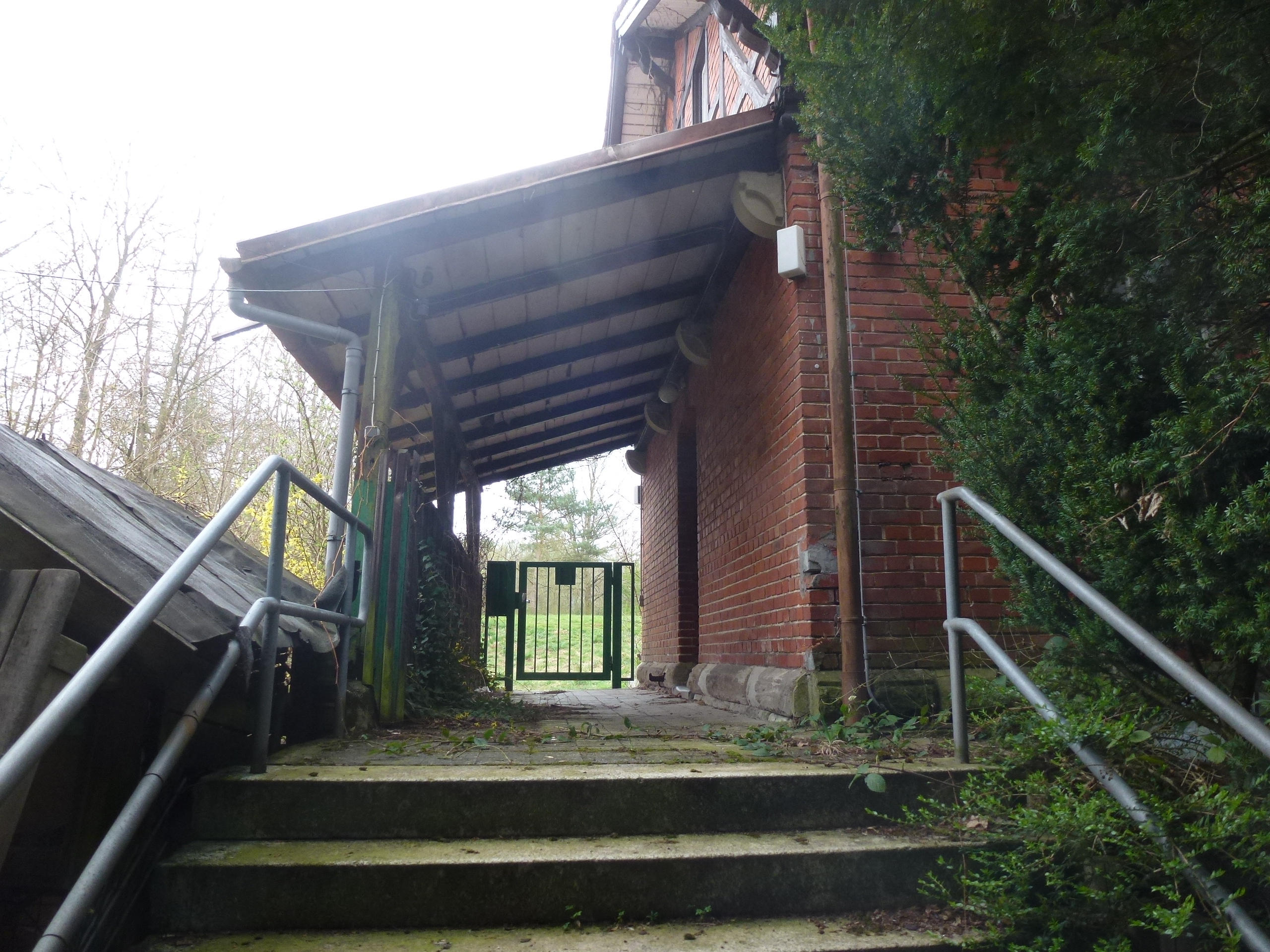 Garnisonsschützenhauses in Stuttgart-Degerloch, Schutzdach des Anbaus von hinten.